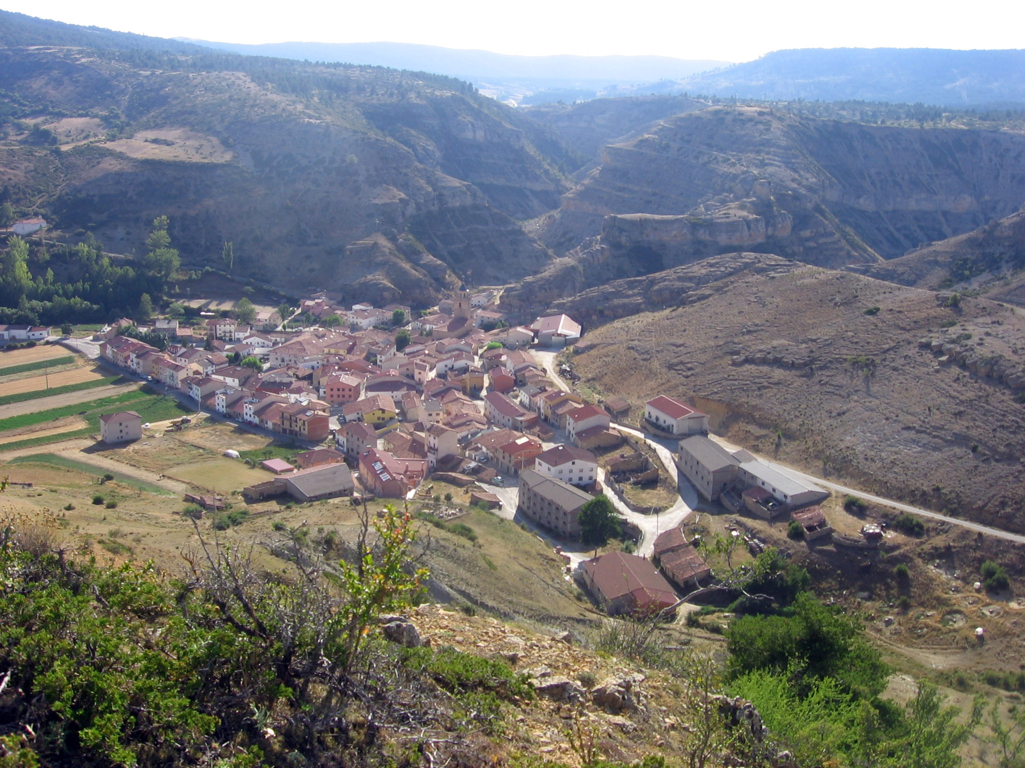 Villar del Cobo, Teruel.